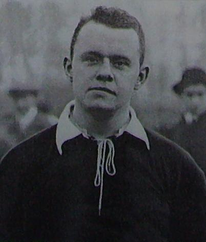 Constant Feith, Nederlands voetballer en international